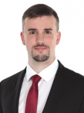 Jakab Péter (Miskolc, 1980. augusztus 16. –) magyar politikus, országgyűlési képviselő, a Jobbik Magyarországért Mozgalom miskolci polgármester-jelöltje a 2014-es önkormányzati választáson és országgyűlési képviselő-jelöltje a 2018-as magyarországi országgyűlési választáson.